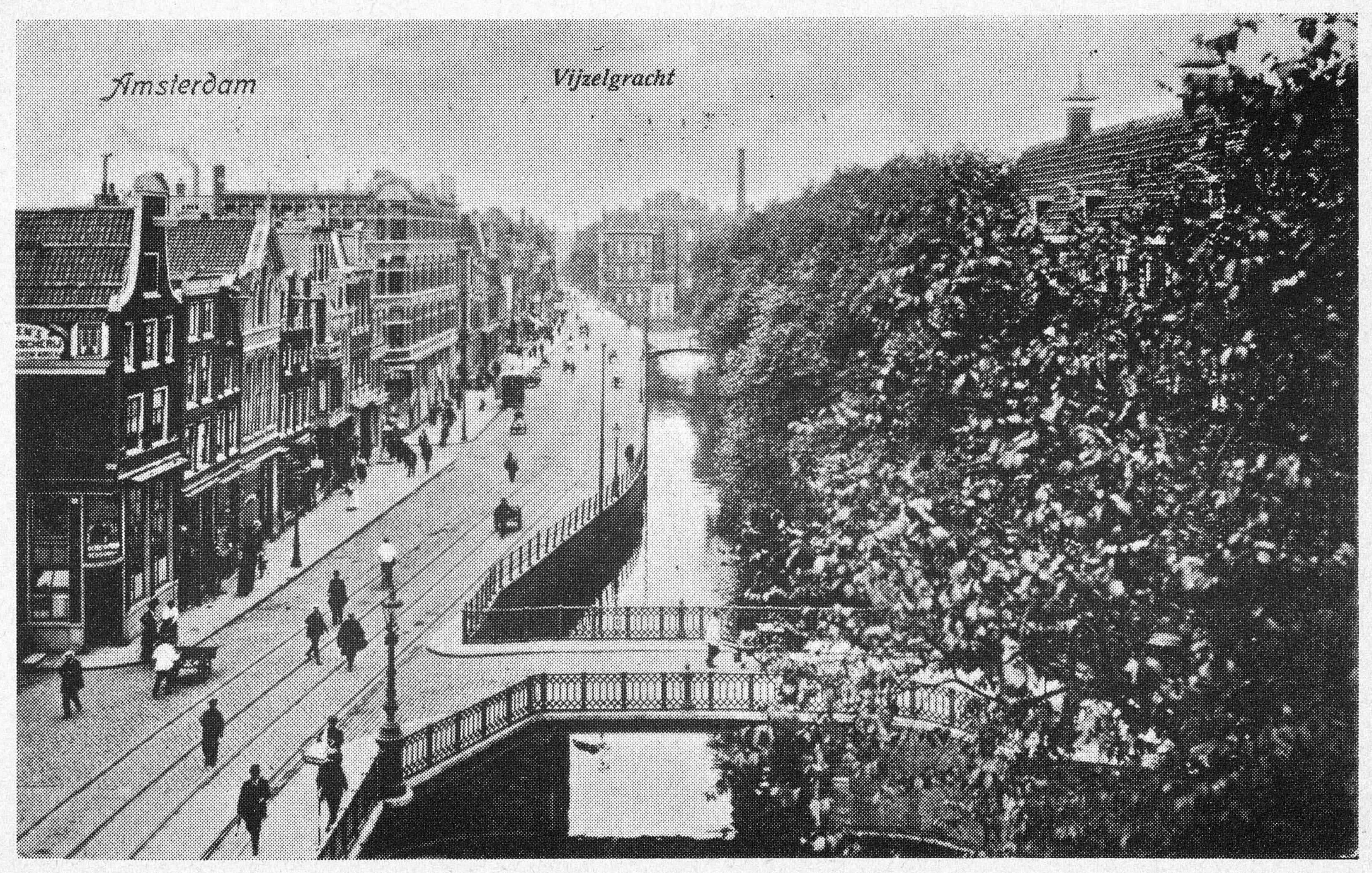 Photographed in Amsterdam between 1900 and 1914; twee verdwenen bruggen over de Vijzelgracht in Amsterdam; op de voorgrond een brug in de Prinsengracht over de Vijzelgracht, en verderop een loopbrug ter hoogte van de Derde Weteringdwarsstraat